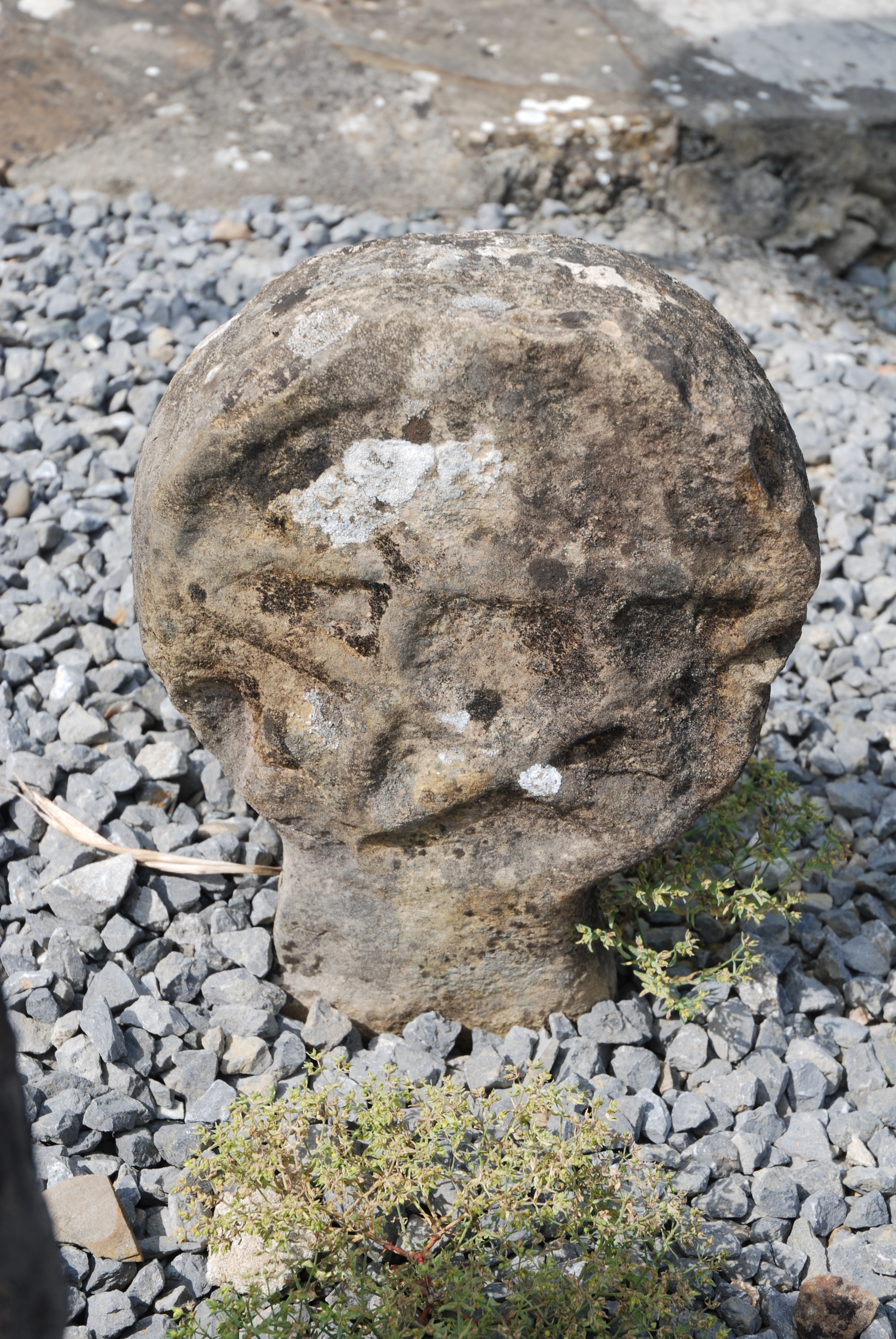 Stèles basques à Arhansus